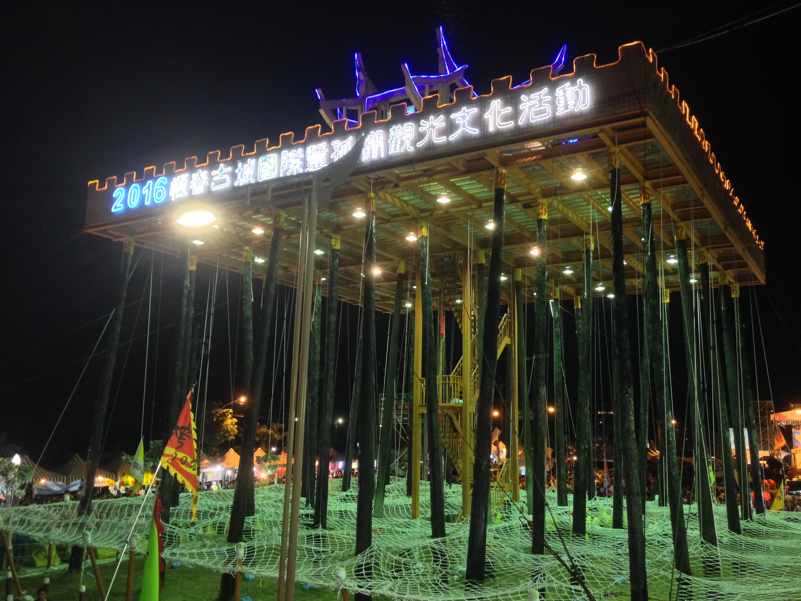 中文（台灣）: 恆春搶孤及爬孤棚